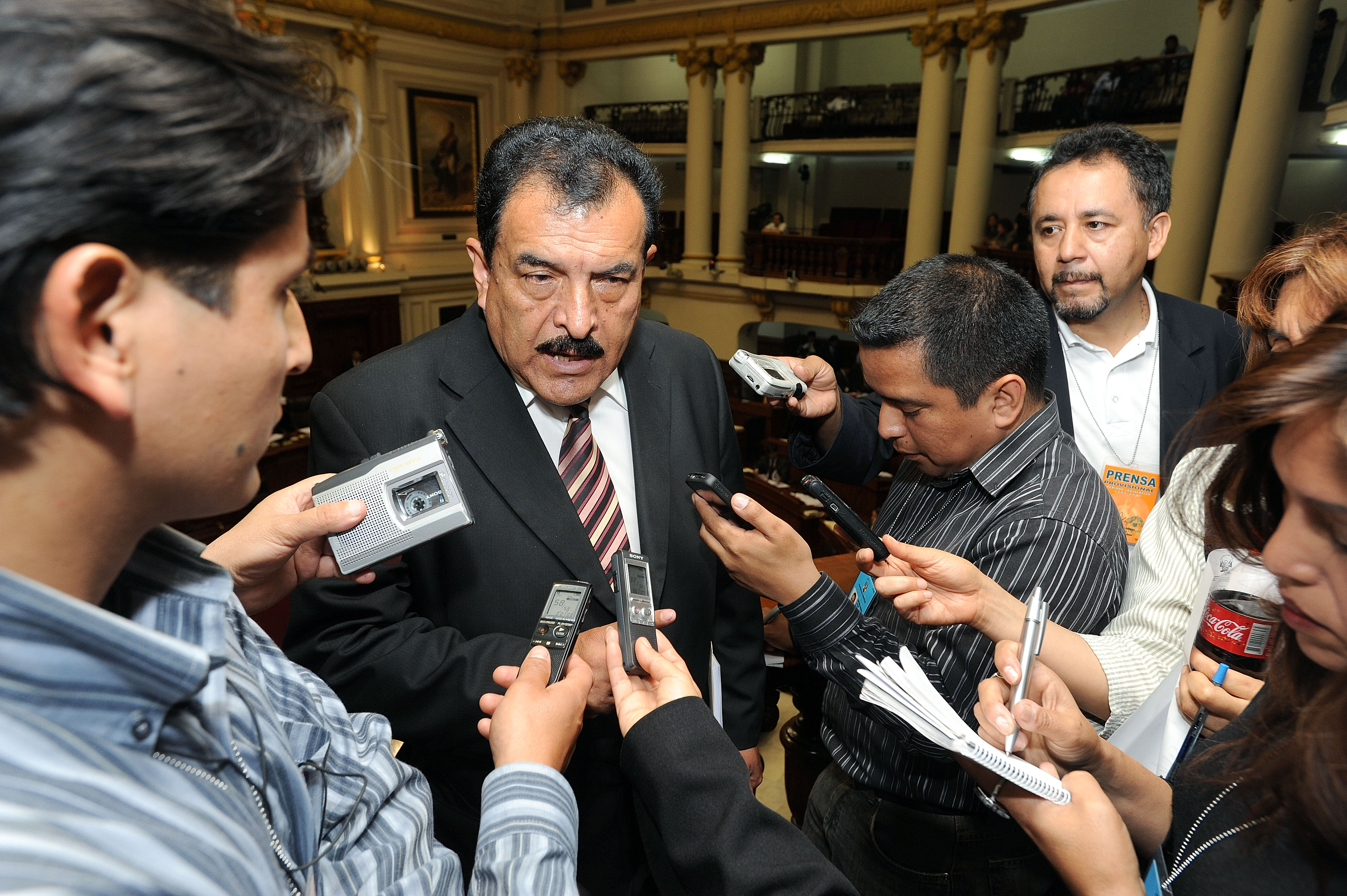 El congresista Edgar Reymundo, presidente del Grupo de Trabajo que evalúa presuntas irregularidades en la gestión del Gobierno Regional de Junín, informa sobre resultados de la labor realizada hasta el momento. Fue en conferencia de prensa en el Hemiciclo del Palacio Legislativo.